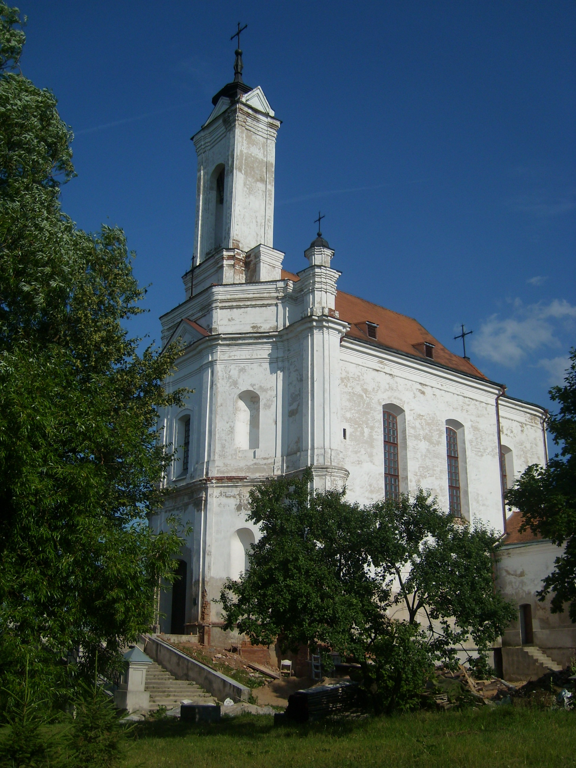 Беларуская (тарашкевіца): Касьцёл Сьв. Марыі. г. Заслаўе This is a photo of Belarusian heritage monument. Reference number: 613Г000328 ( WLM)